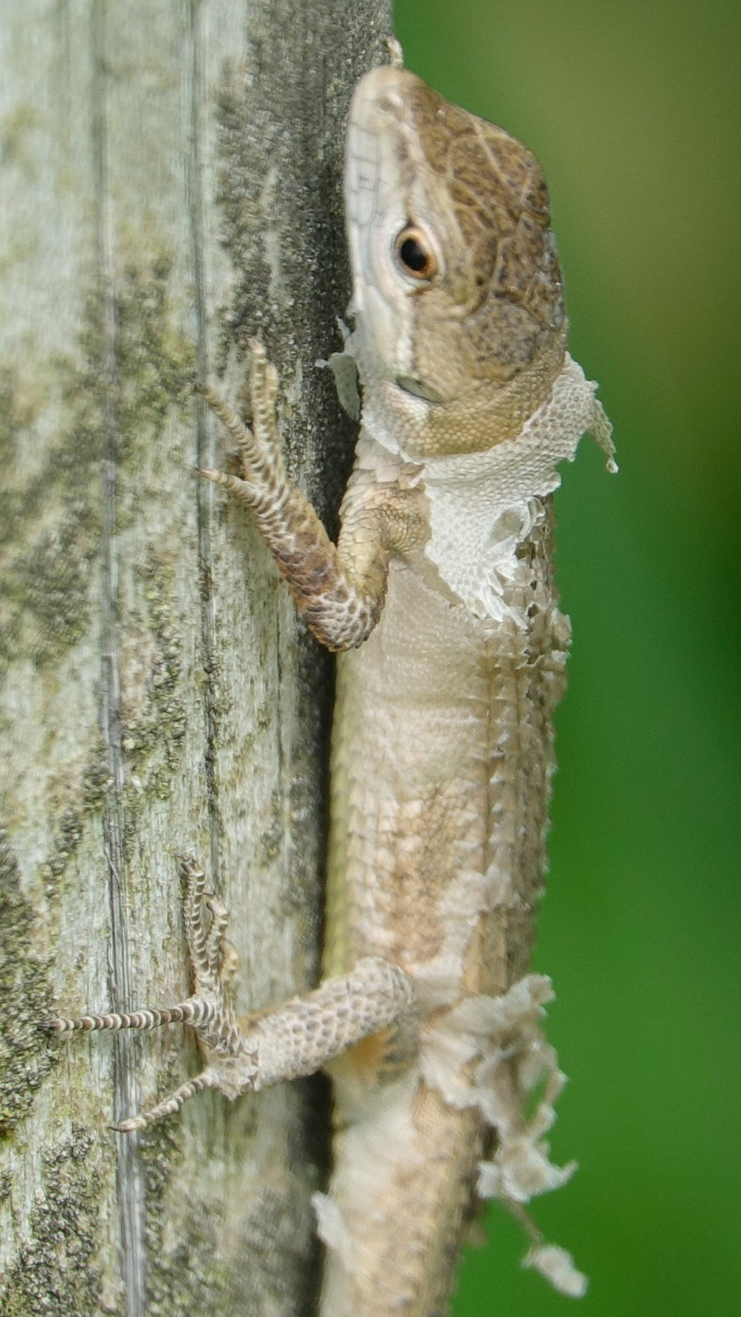 脱皮するカナヘビ 日本、東海地方